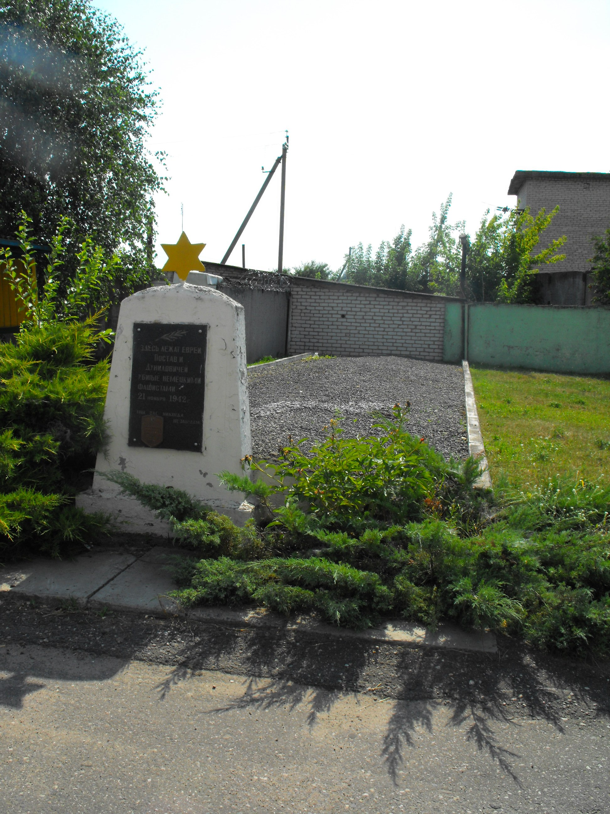 Памятник на месте массового убийства евреев Постав и Дуниловичей во времена Холокоста. Находится в Поставах на улице Ленинской (бывшая Браславская), напротив дома № 145, на территории ДРСУ-132, где во время войны был железнодорожный переезд.